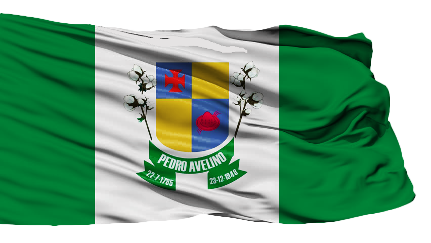 Bandeira do Municipio de Pedro Avelino - RN